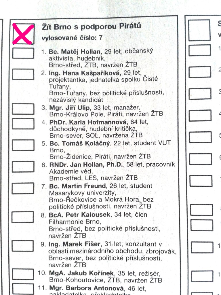 Část hlasovacího lístku pro volby do magistrátu města Brna v roce 2014 se zaškrtnutou kandidátkou „Žít Brno s podporou Pirátů“